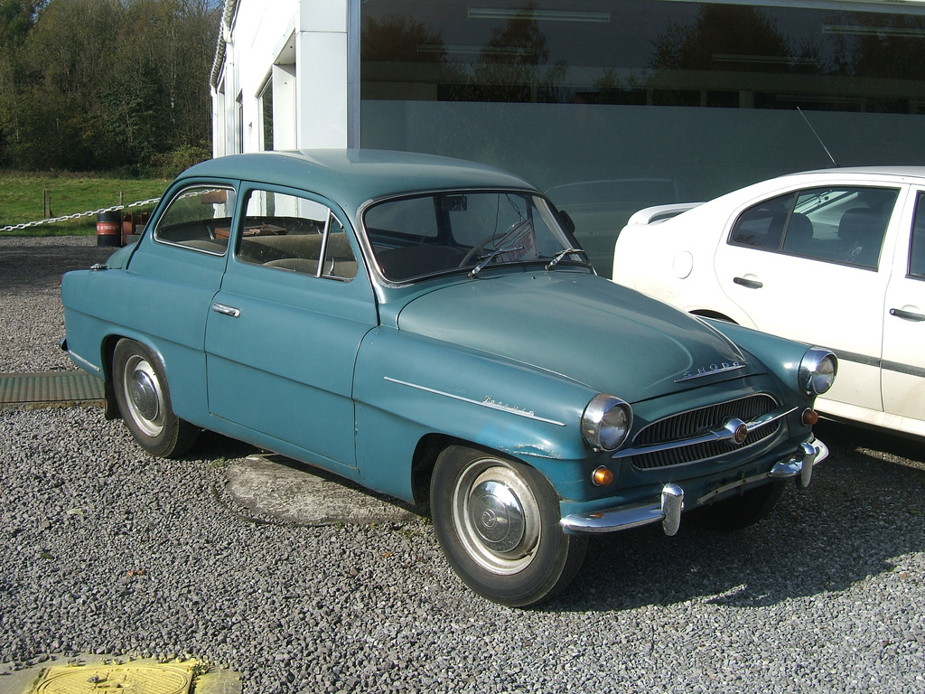 Škoda Octavia 985 (1959)Old Skoda